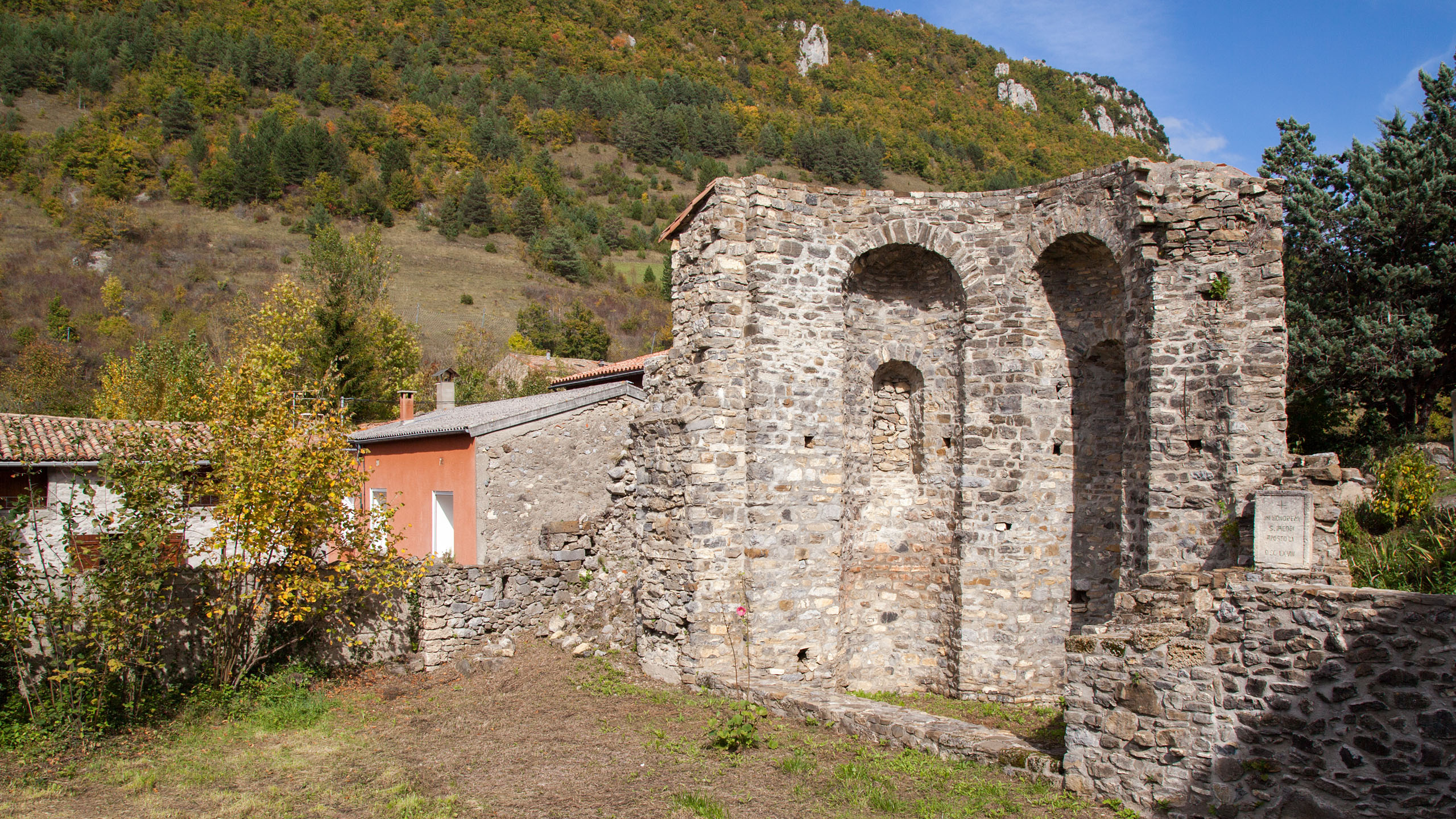 Ruines de l'abbaye de Joucou